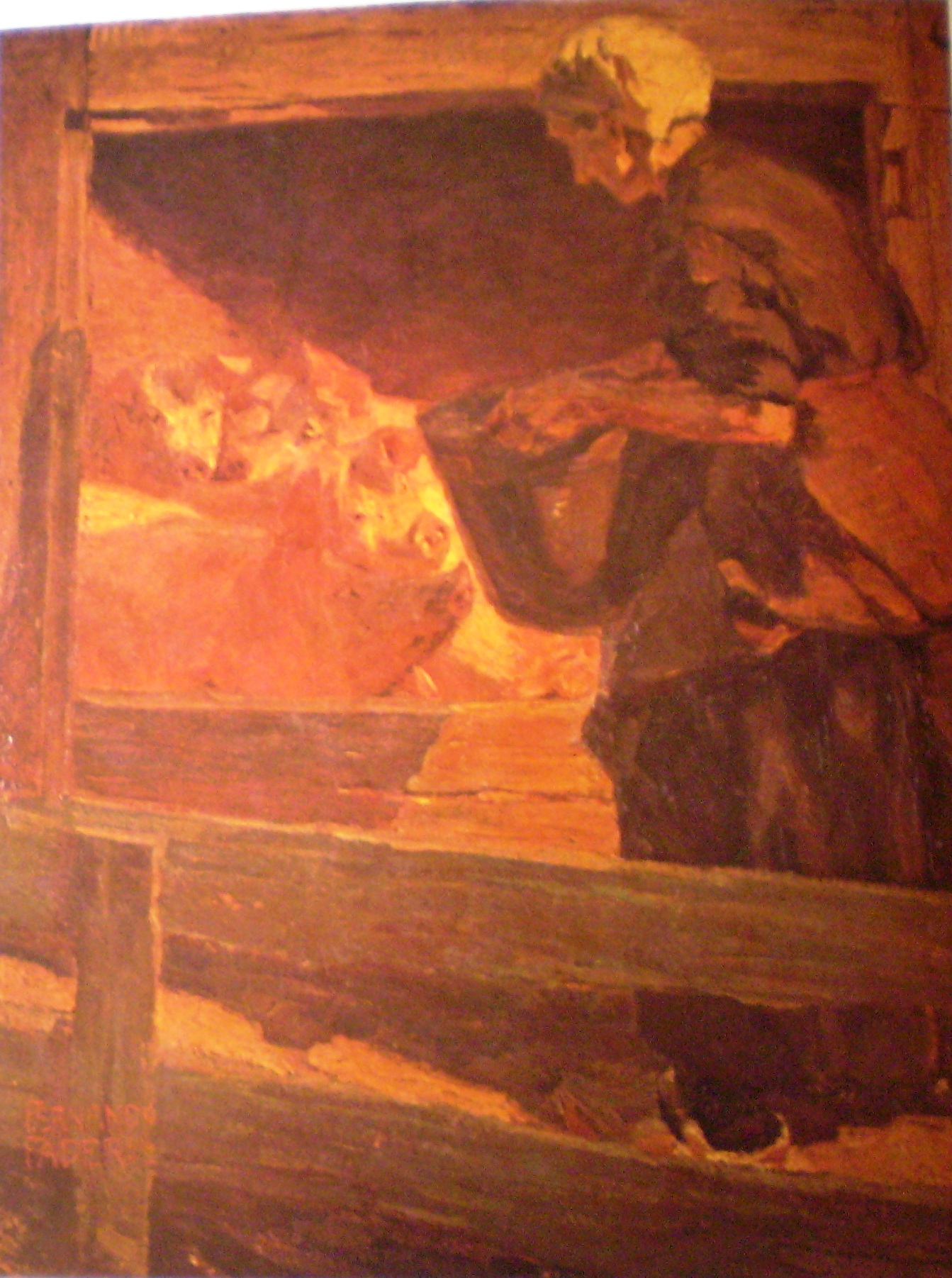 see below